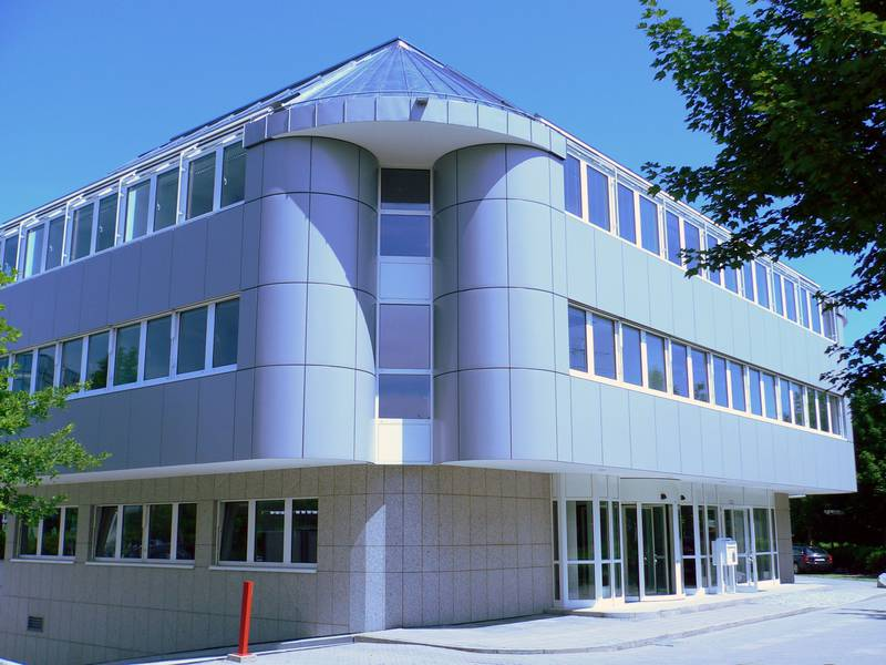 Hochschulcampu Ismaning